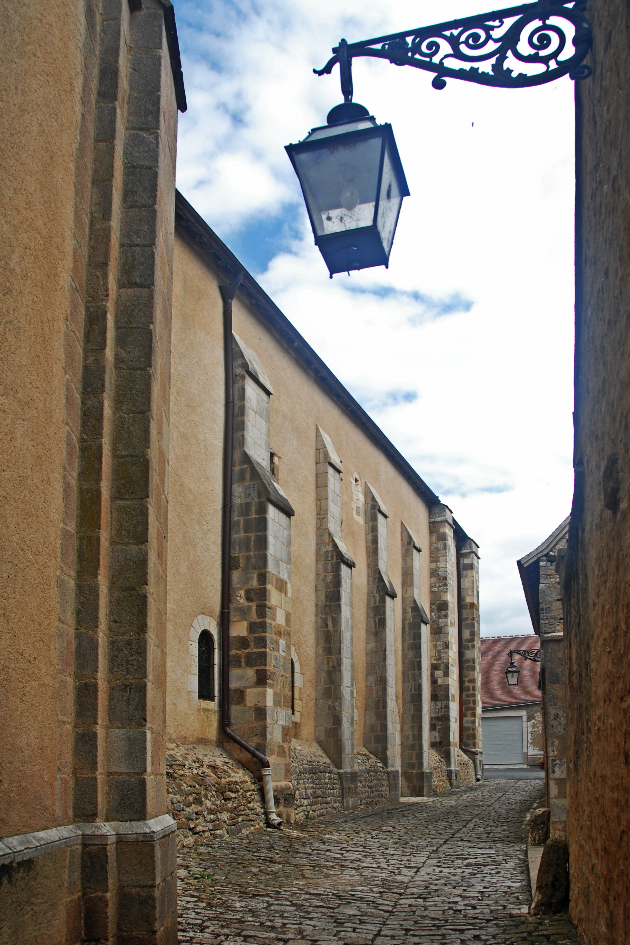 Neuvy_St.-Sépulcre, Basilika,SW-Seite von NW